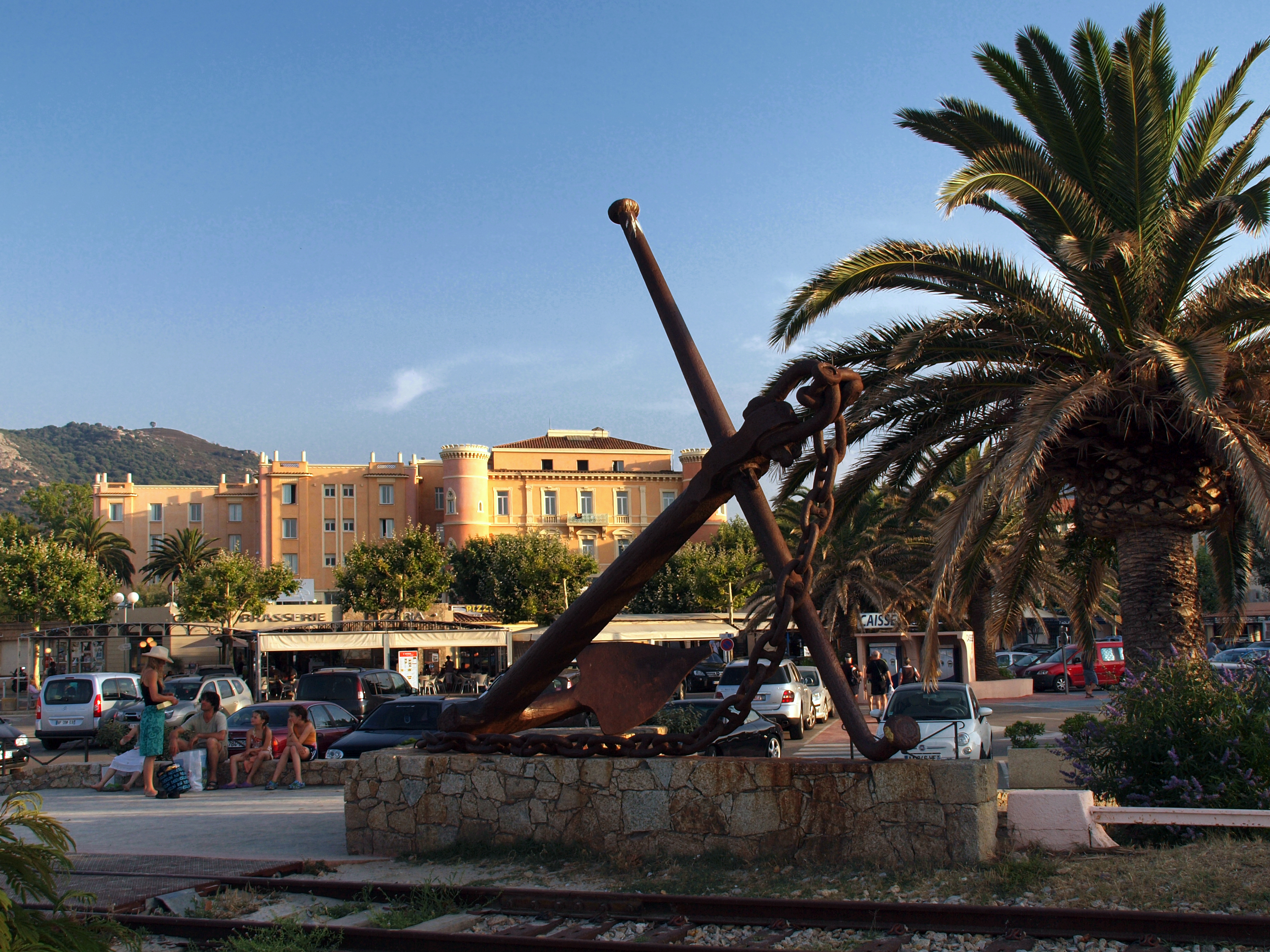 L'Île-Rousse (Corse) - L'hôtel Napoléon Bonaparte au Centre-ville et dont le jardin est inscrit à l'inventaire général du patrimoine culturel